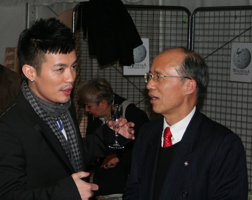 Van Fan interprète du film Cape N° 7 et Michel Ching-long Lu Ambassadeur de Taiwan en France